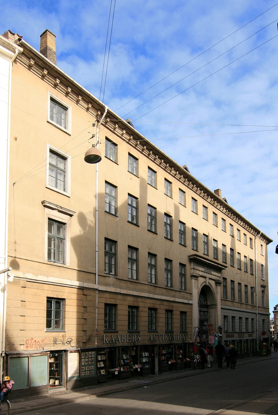 Soldins Stiftelse, Skindergade 34, København. Bygget 1815. Fredet.